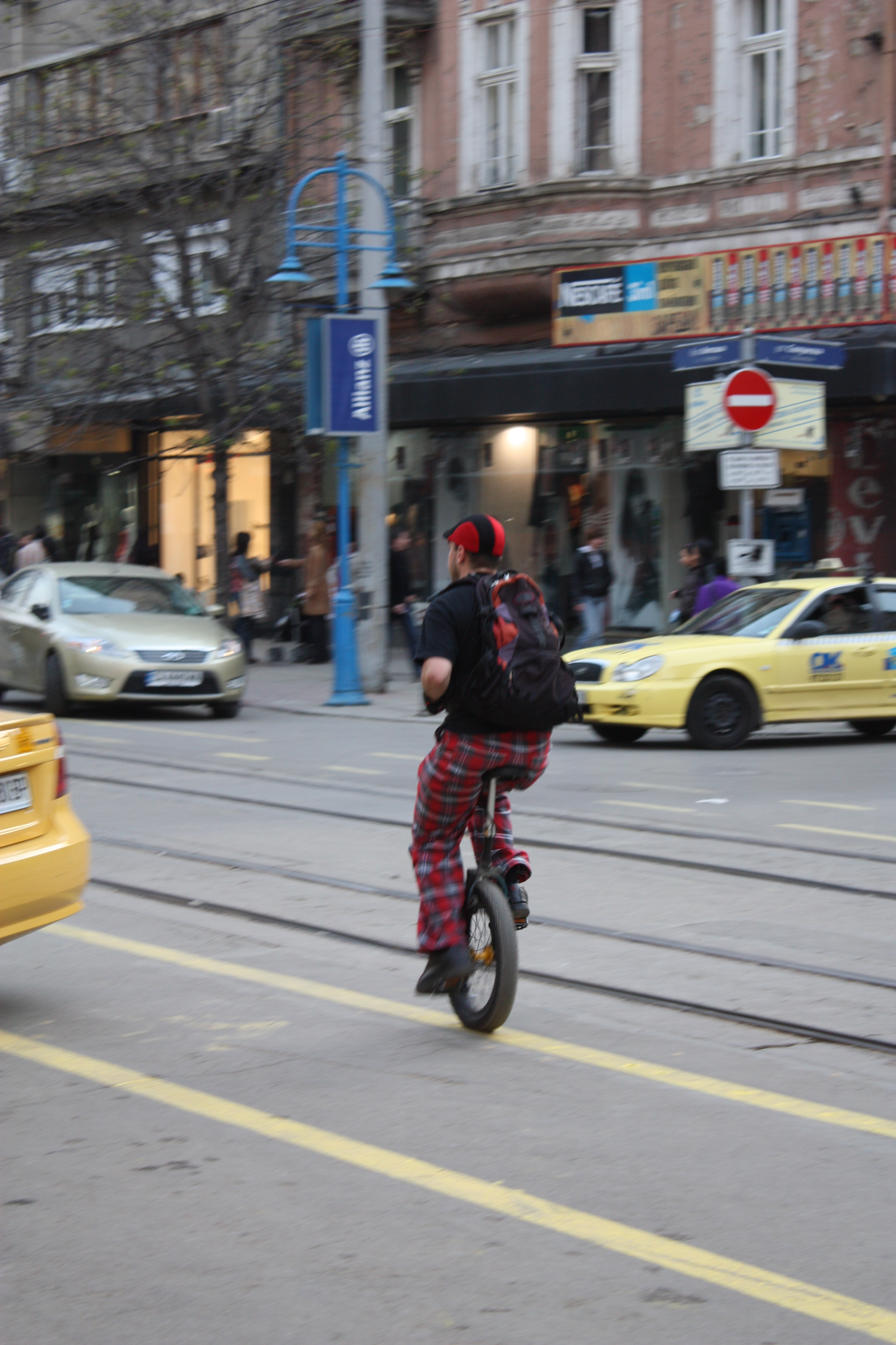 Boulevard Vitosha, Sofia, Bulgaria